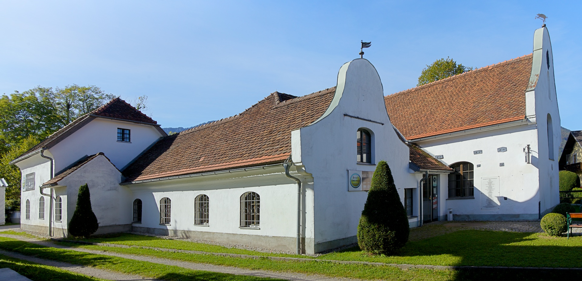 Stainhuberhammer